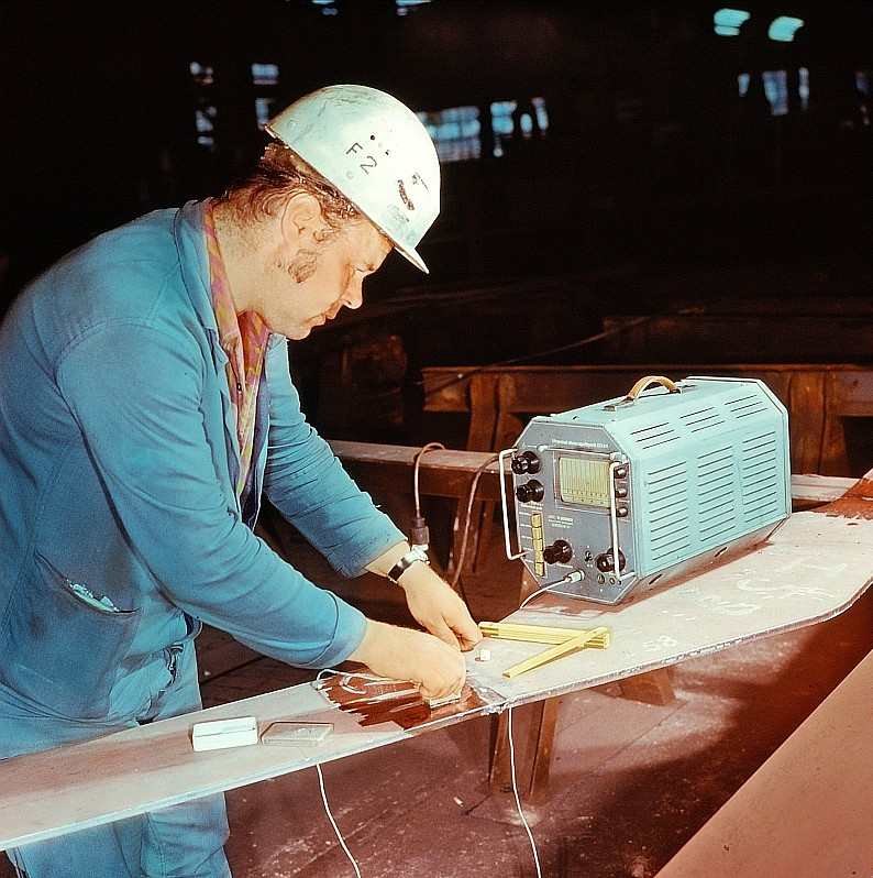 Original image description from the Deutsche Fotothek Facharbeiter für Qualitätskontrolle